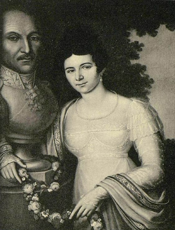 Grafinia Maria Matveevna Platova, 1791-1866